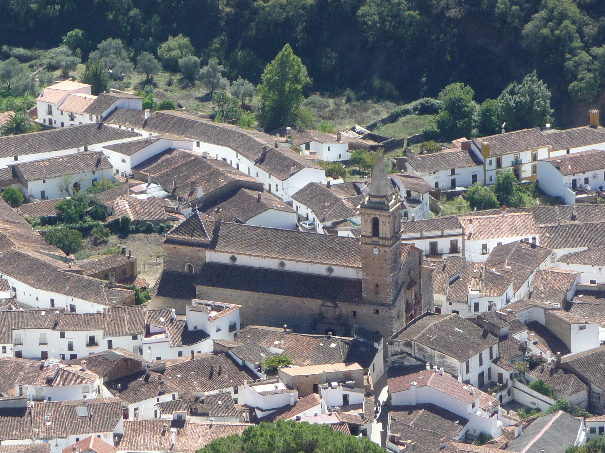 Alajar-P1040911.JPG